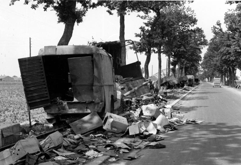 Geräumte Vormarsch- Strasse